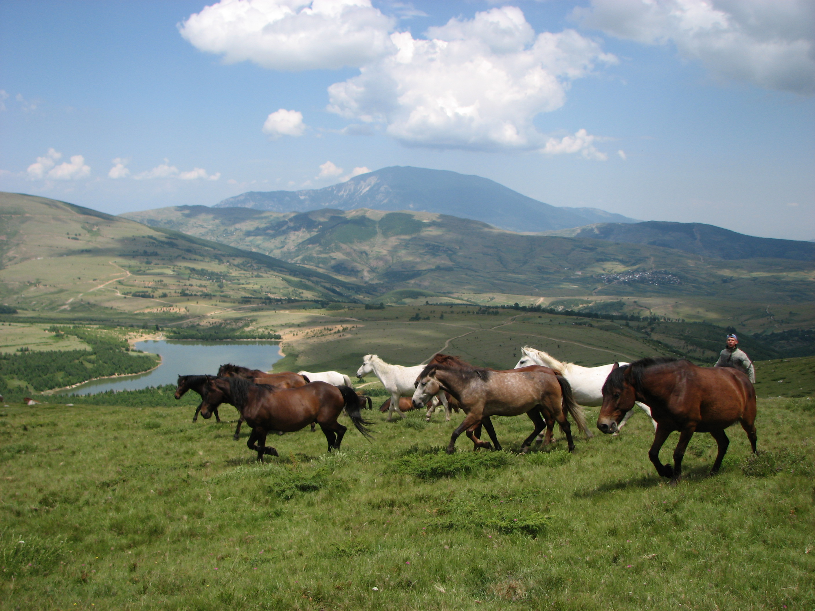 Bjeshket e kallabakut ndodhen ne territorin e Komunës Shishtavec, Kukës Albania. Ato janë të pasura kullota alpine.